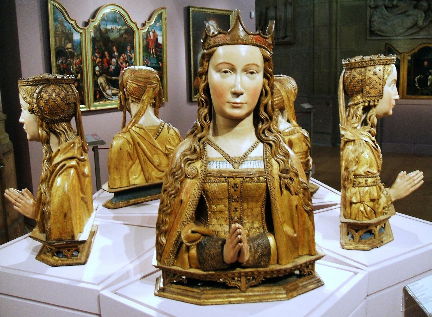 Bustos Relicarios de Santa Úrsula y cuatro compañeras mártires (s-XVI), Museo Diocesano de Arte Sacro de Álava, situado en la girola de la Catedral Nueva de Vitoria-Gasteiz